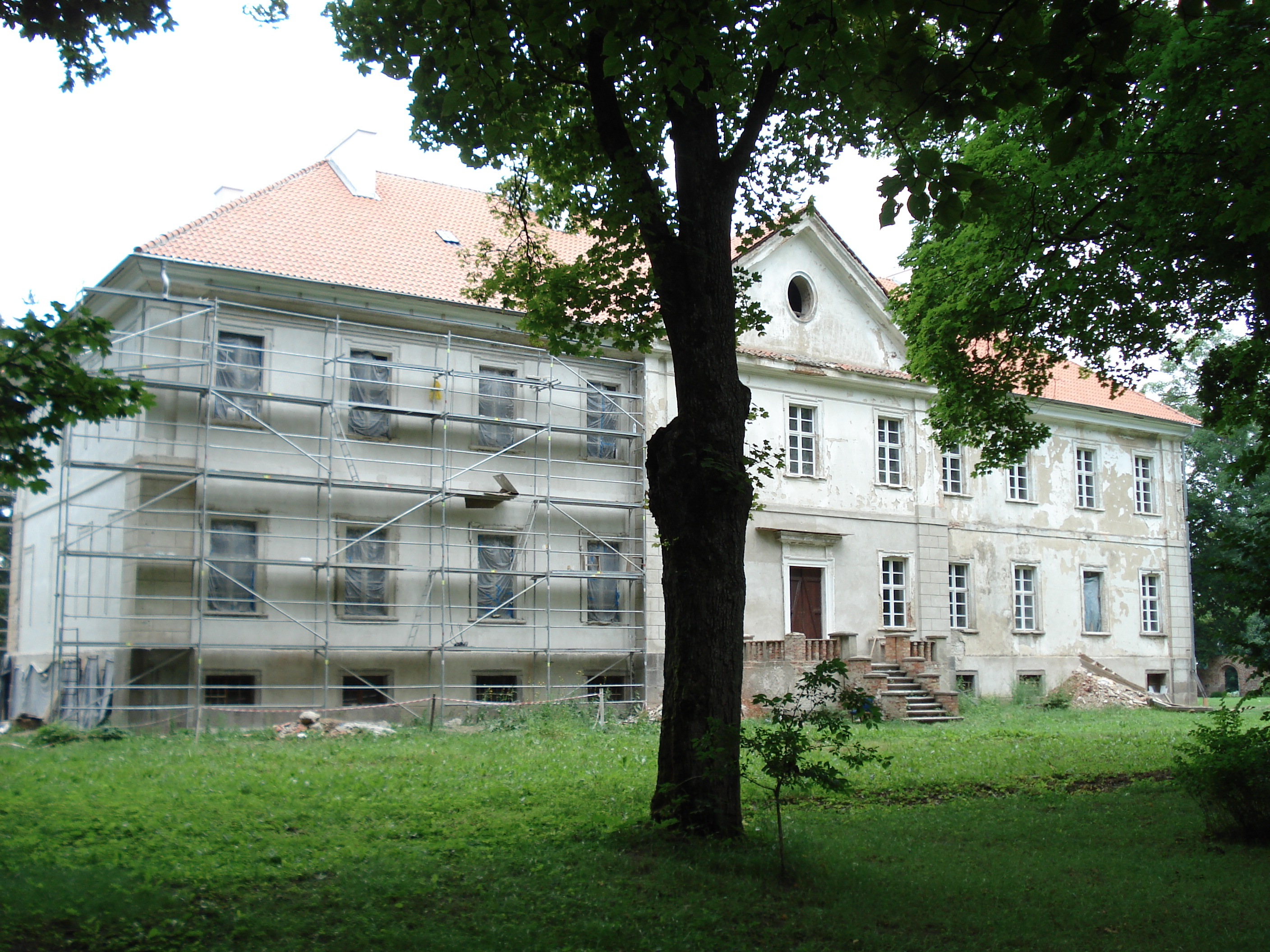 Nakomiady - pałac, elewacja od strony ogrodowej (zabytek nr A-45 i 85 z 12.09.1949).